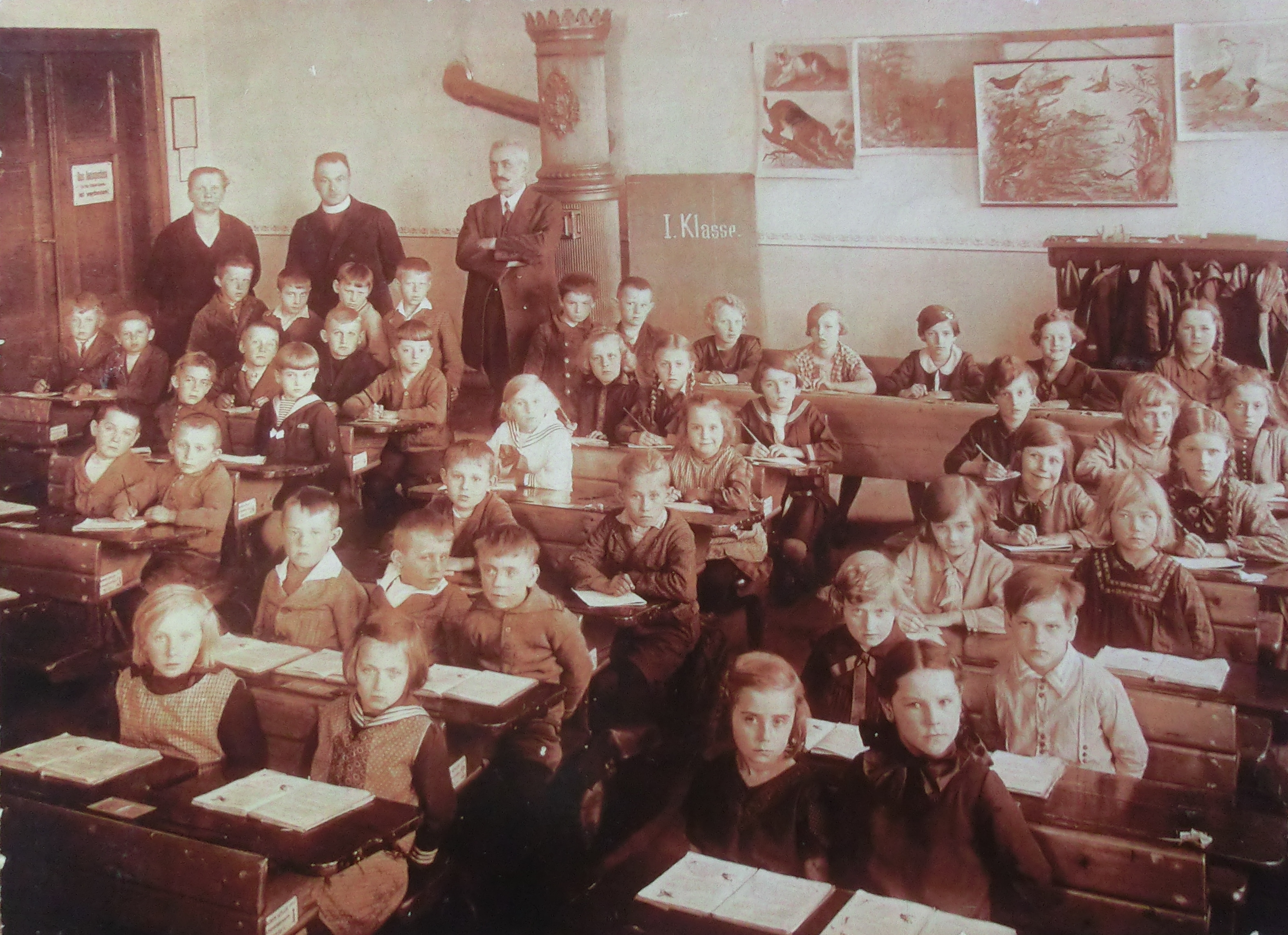 1929 Škola Libochovany, farář Henr. Franz